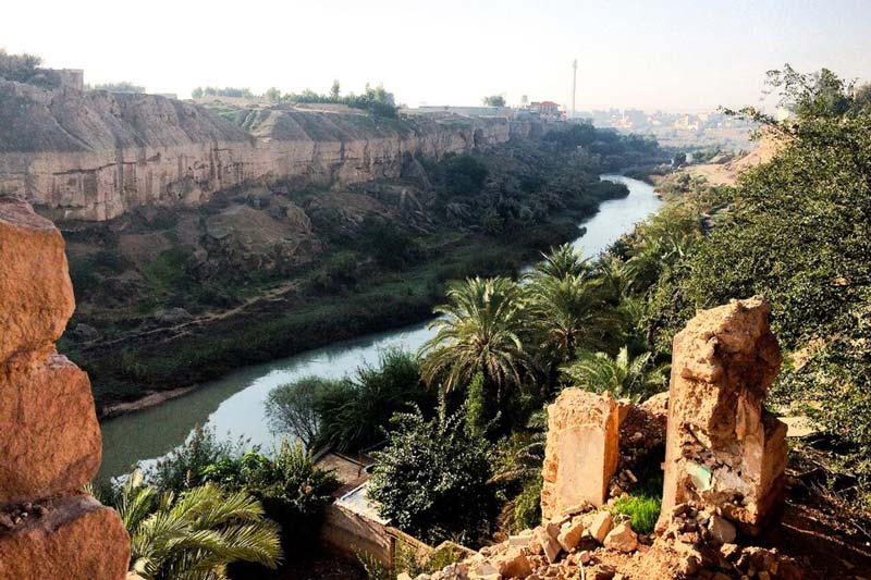 باغ خان پایین